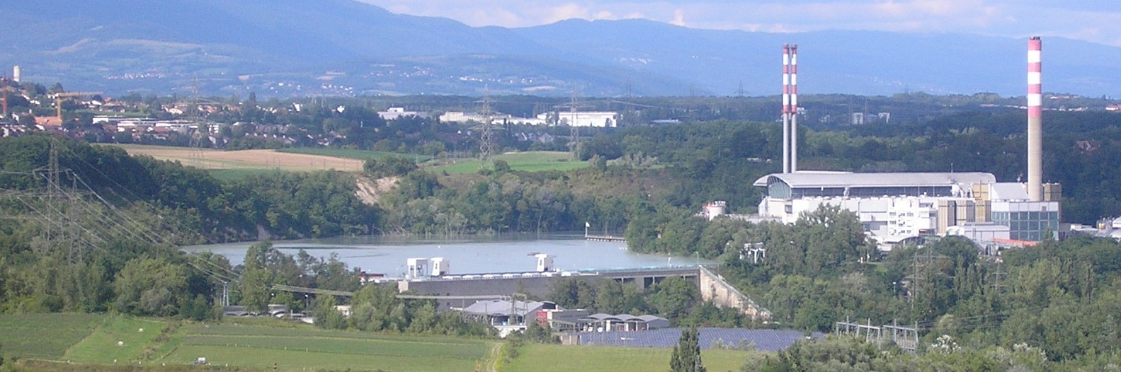 Barrage de Verbois et usine d’incinération des Cheneviers (commune d'Aire-la-Ville). Arrière plan : Satigny, ZIMEYSA (zone industrielle de Meyrin-Satigny) dans le canton de Genève. Chaîne montagneuse : le Jura. Photo prise depuis la commune de Russin.